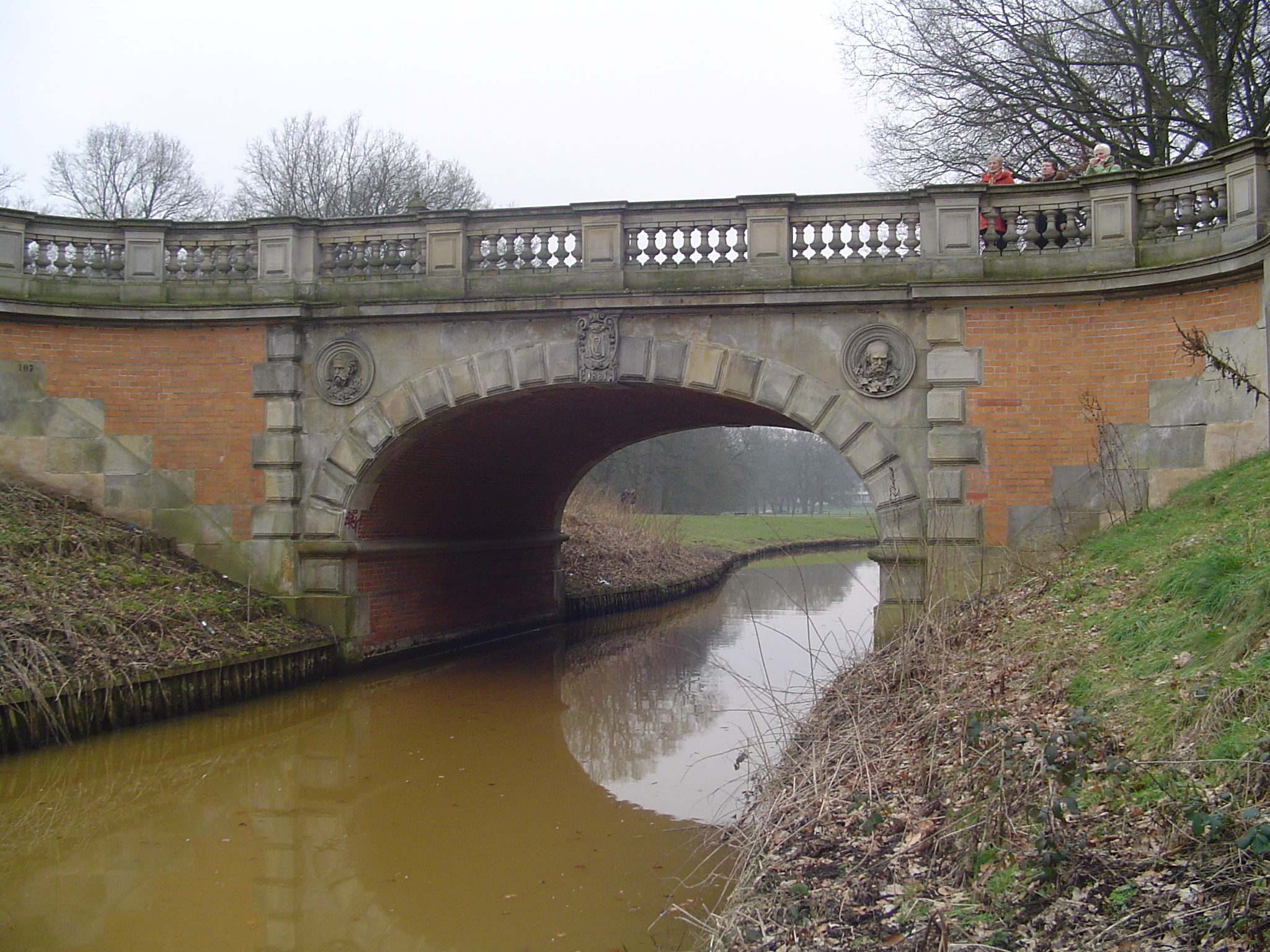 Melchersbrücke im Bremer Bürgerpark. Gestiftet 1881. Ansicht von Süden. In der Brückenöffnung angeschnitten das Parkhotel Bremen. Das abgebildete Objekt ist ein geschütztes Kulturdenkmal in der Freien Hansestadt Bremen, mit der Nr. 0218,T018 beim Landesamt für Denkmalpflege registriert.